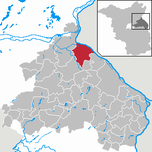 Oderaue in Brandenburg (Country) - District Märkisch-Oderland